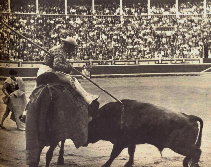 Toro "Guineo" de la ganadería del Conde de la Corte, premiado con el Trofeo Carriquiri en la Feria de San Fermín de 1965 y que fue lidiado por Diego Puerta